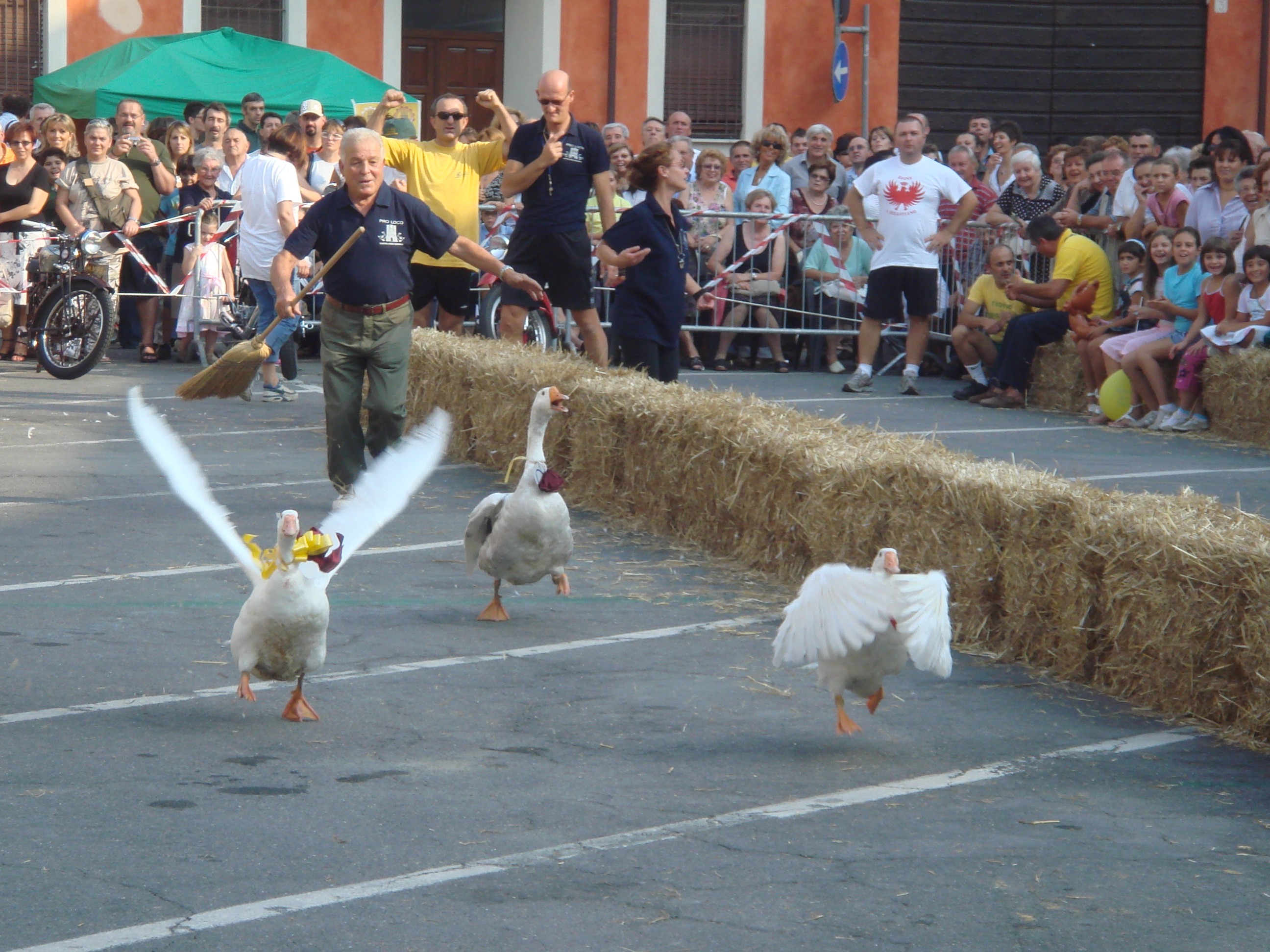 Una delle corse del palio dell'oca di Castellazzo Bormida nel 2007